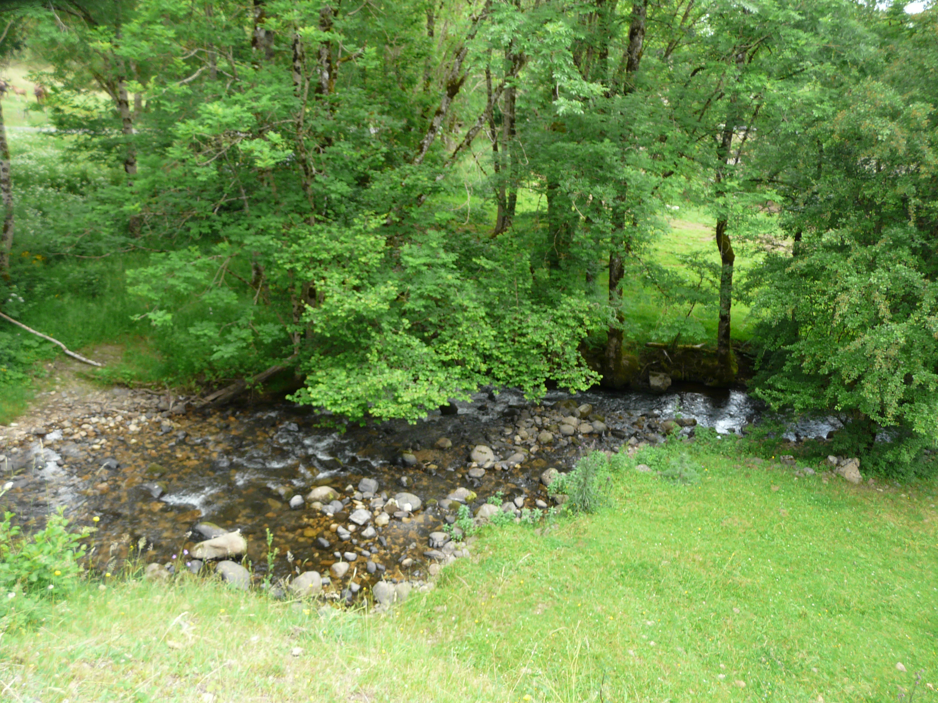 Le Bonjon en aval du pont de la route départementale 36, Marcenat, Cantal, France.